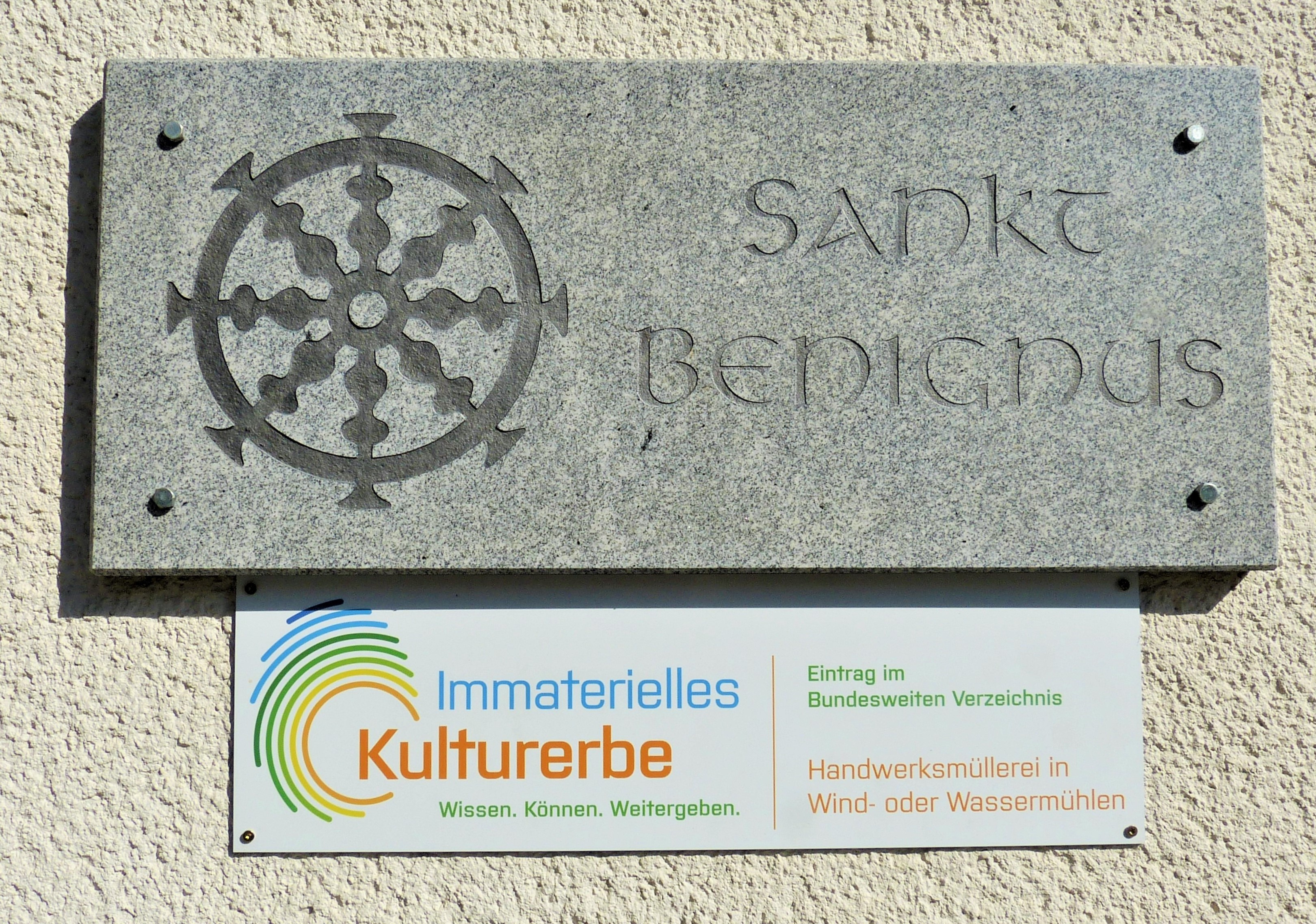 Dinkelmühle, 2019